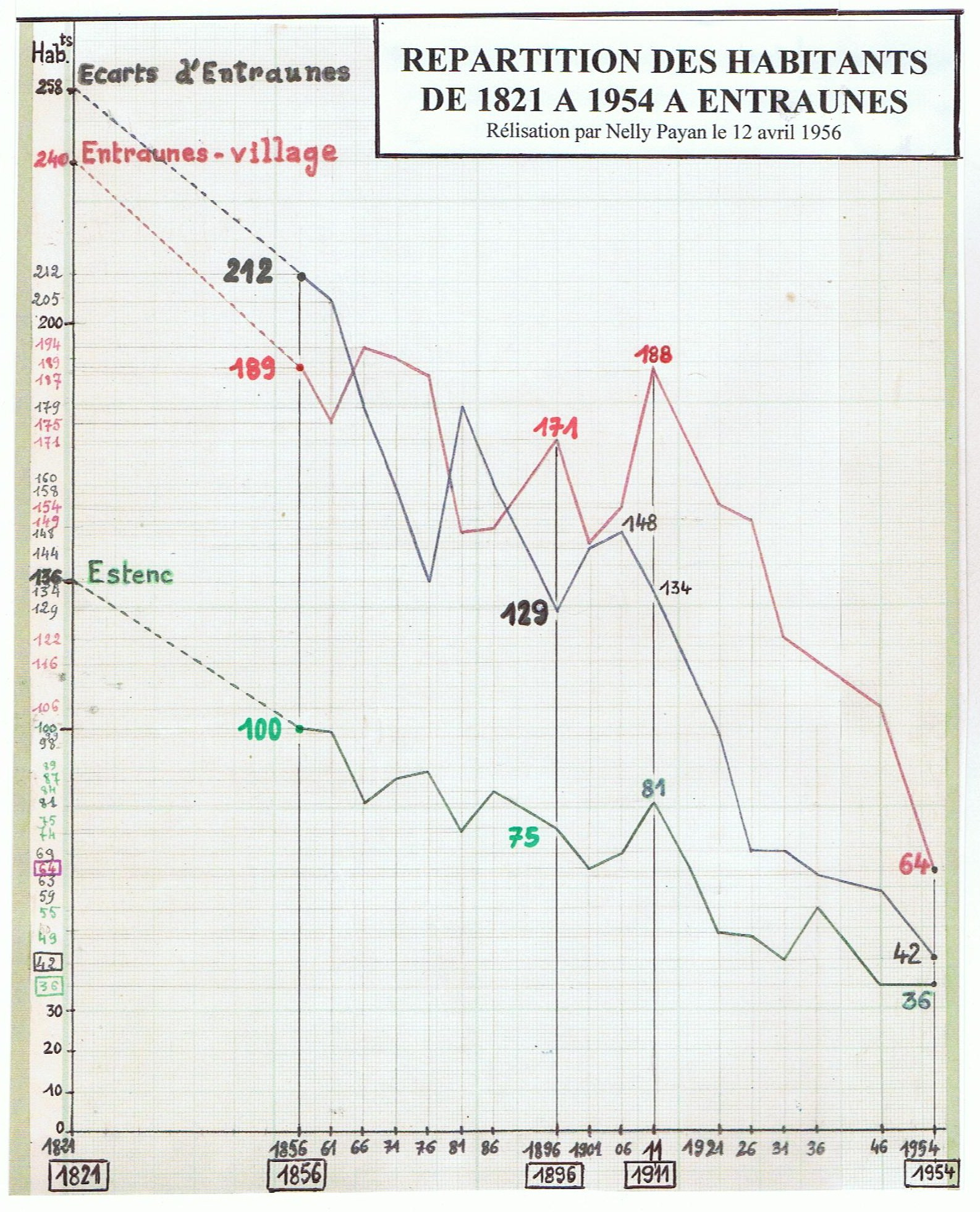 Evolution de 1821 à 1954 de la répartition des habitants entre le village d'Entraunes, ses écarts et le bassin d'Estenc